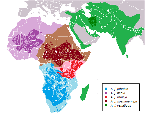 این پرونده منطقه زیستگاه یوزپلنگ آسیایی و همچنین بقیه نوع های یوز پلنگ را نشان می دهد